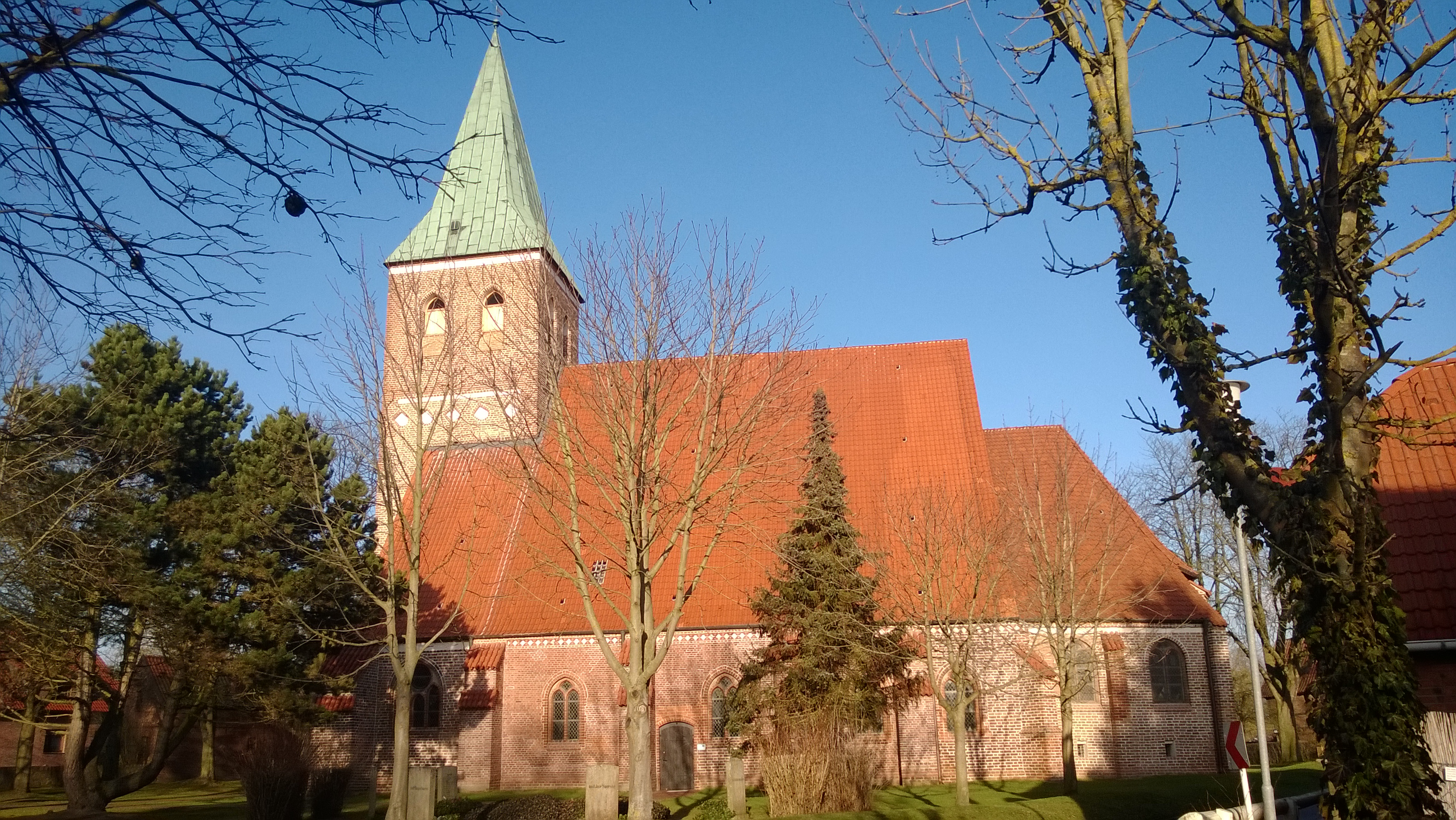 Südseite der St. Marien Kirche in Plate (Lüchow-Dannenberg)